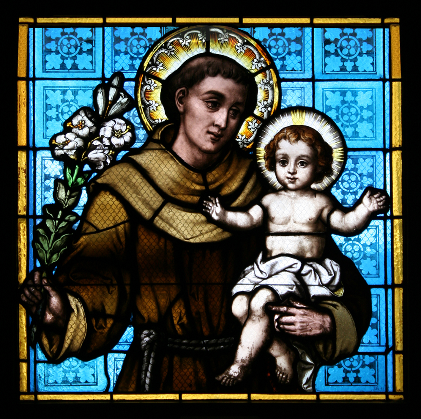 Römisch-katholische Pfarrkirche St. Antonius Egg